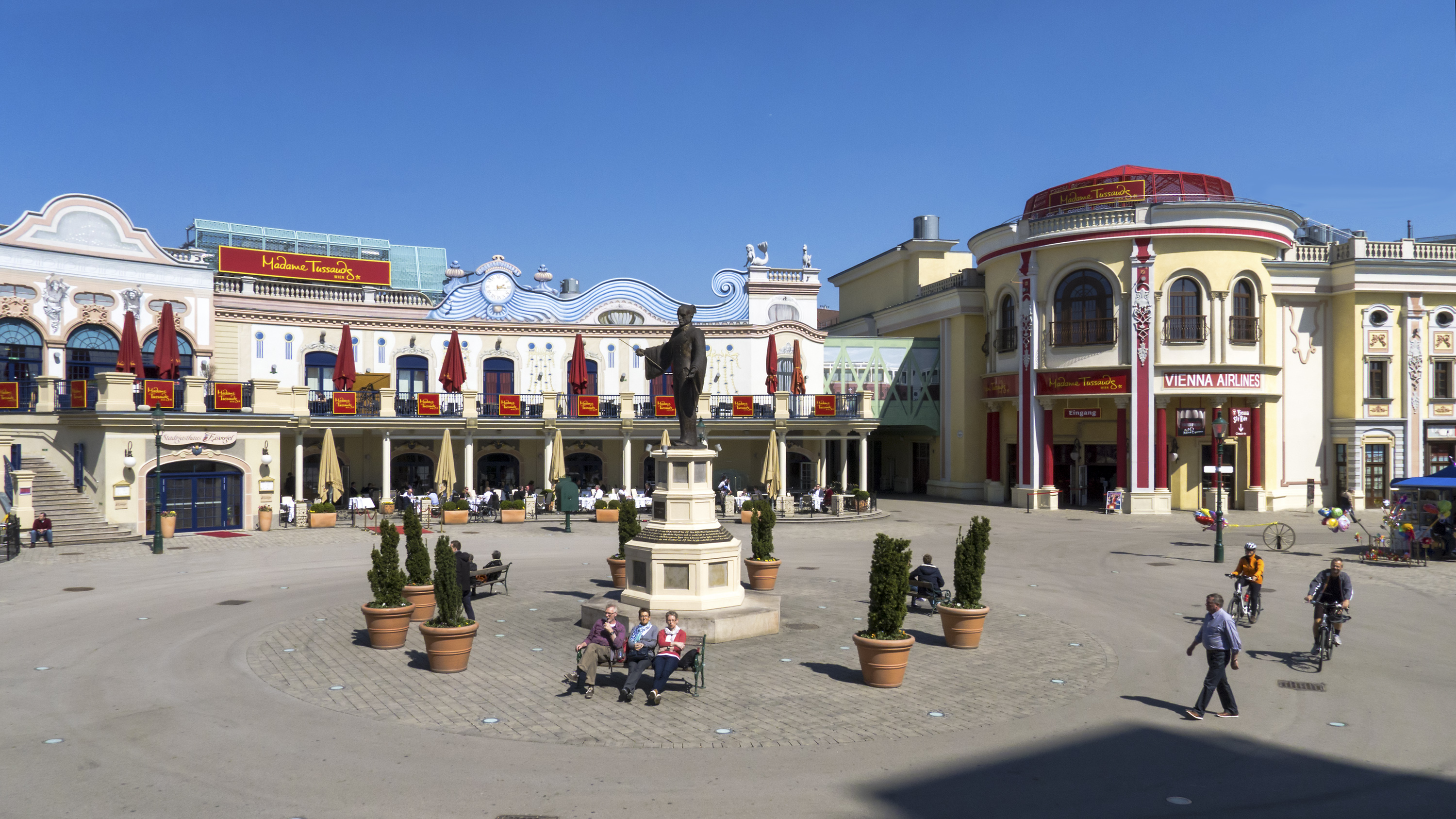 Riesenradplatz in Wien 2 Richtung Nordwesten